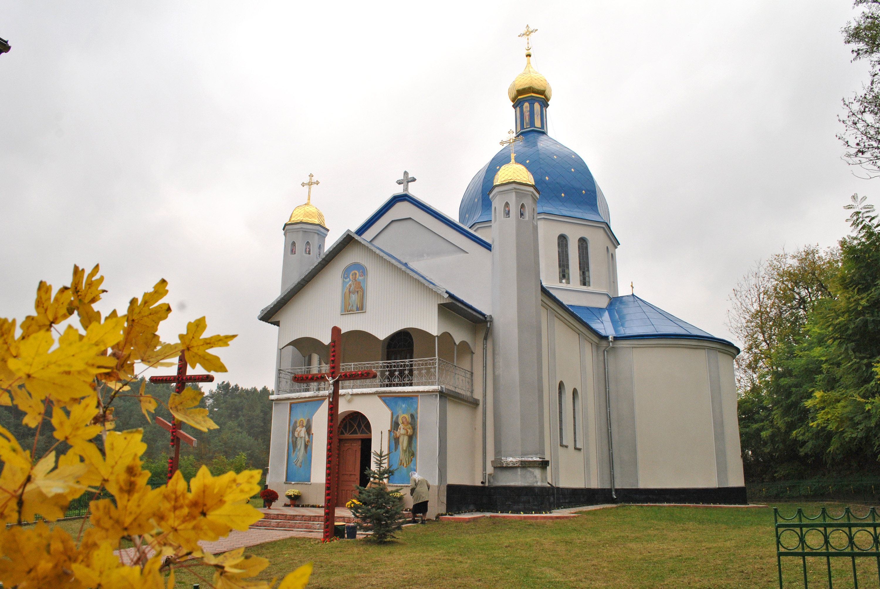 Пам'ятка архітектури місцевого значення: церква Святого Миколая (мурована) в Тудорові Гусятинського району Тернопільської області.